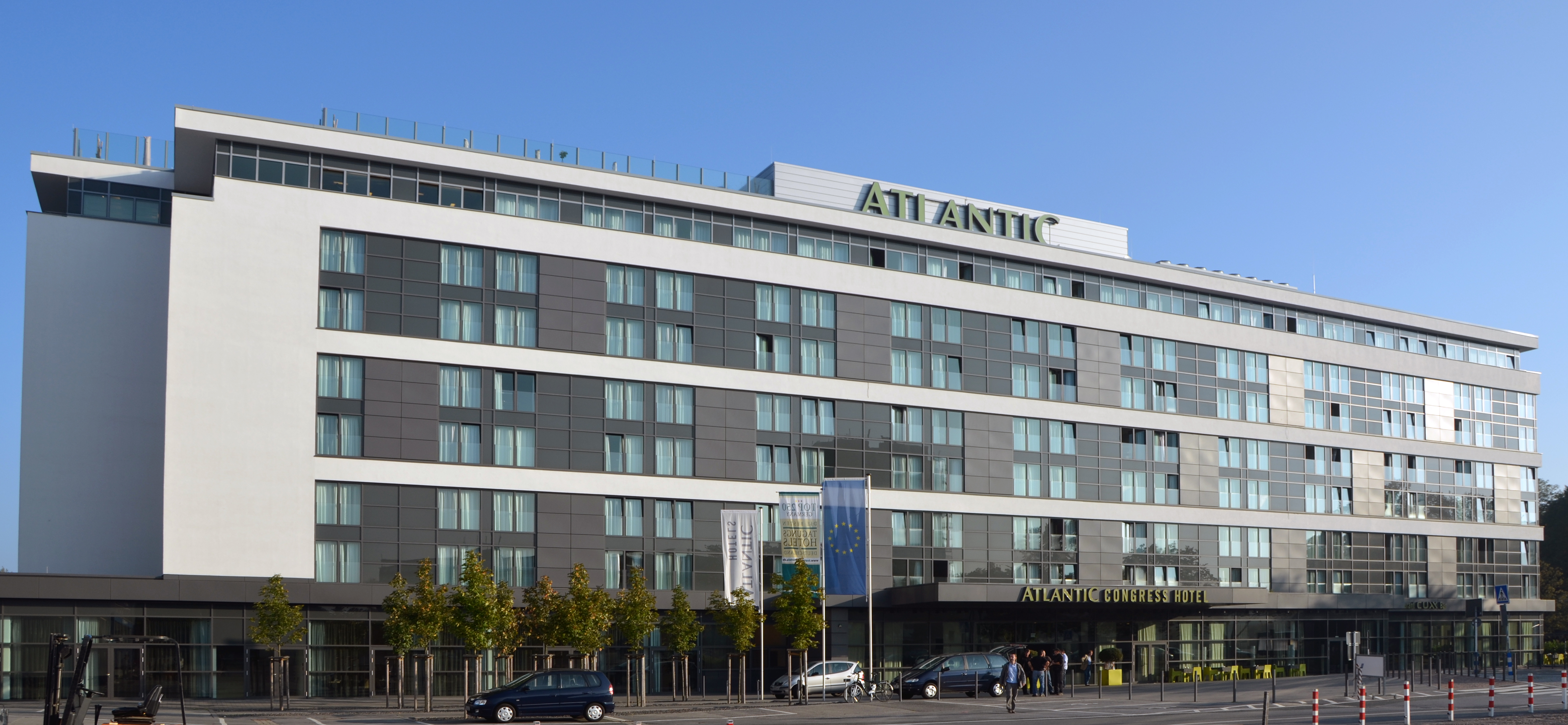 Atlantic Congresshotel in Essen